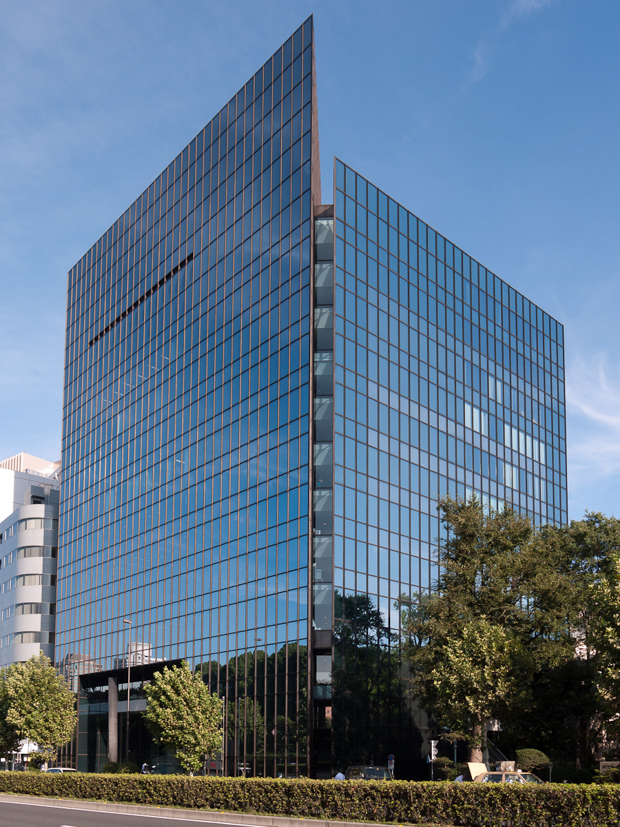 草月会館、東京都港区赤坂7丁目。